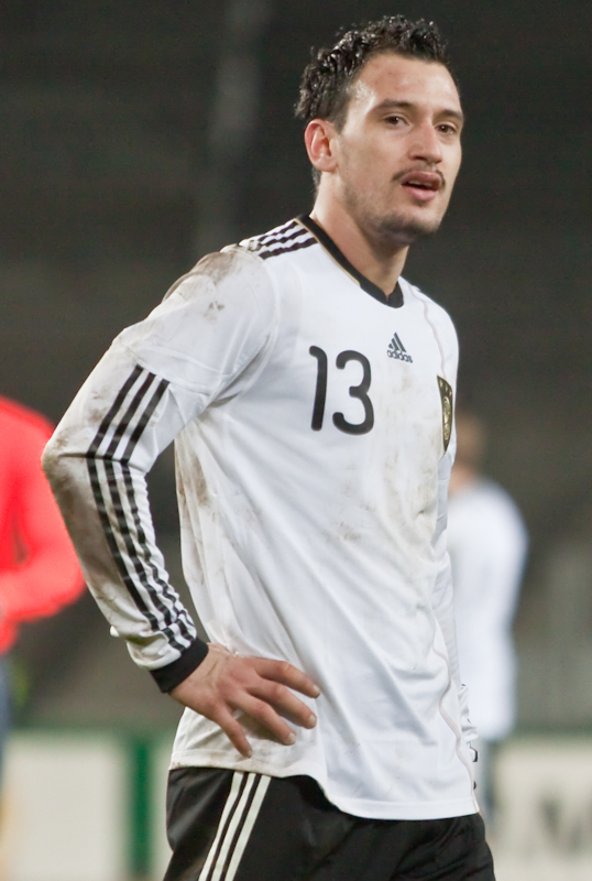 Timo Gebhart im Trikot der deutschen U-21-Mannschaft.